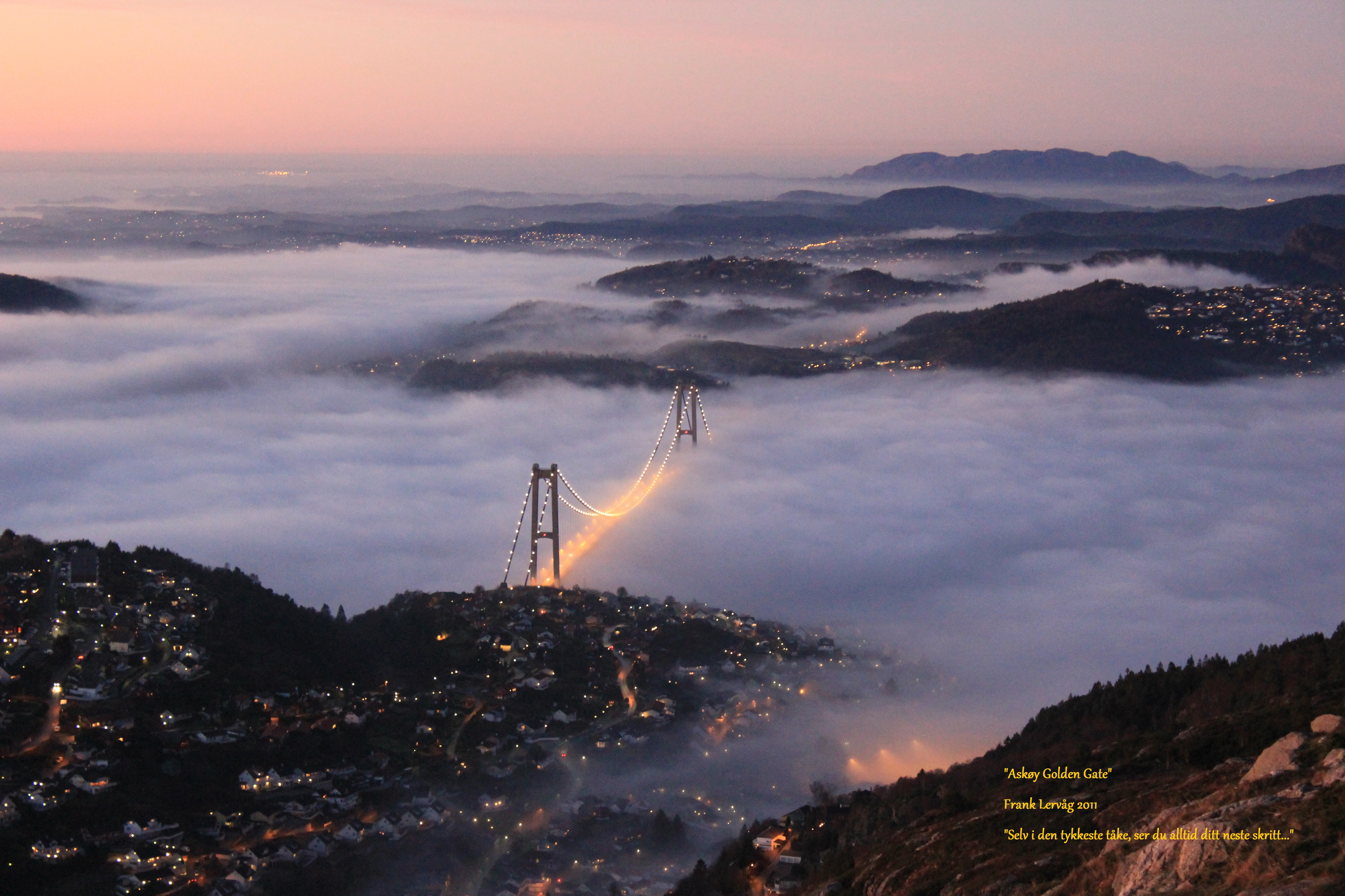 Askøybrua i tåke. Tatt 11. november 2013 av Frank Lervåg med Canon EOS 550D